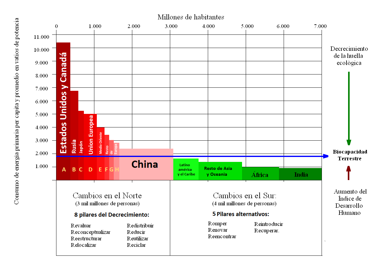 Solución decrecentista por regiones del mundo basada en la huella ecológica. En tonos en color rojo aquellas regiones que necesitan disminuir su huella ecológica A) Estados Unidos y Canadá, B) Rusia, C) Japón, D) Unión Europea (1°-15° lugar) E) Medio Oriente, F) Unión Europea (16°-27° lugar), G) países que antes integraban parte de la URSS, H) otros países Europeos y Turquía y China. En tonos en color verde aquellas regiones con una huella ecológica apropiada Latinoamérica y el Caribe, resto de Asia y Oceanía, África e India